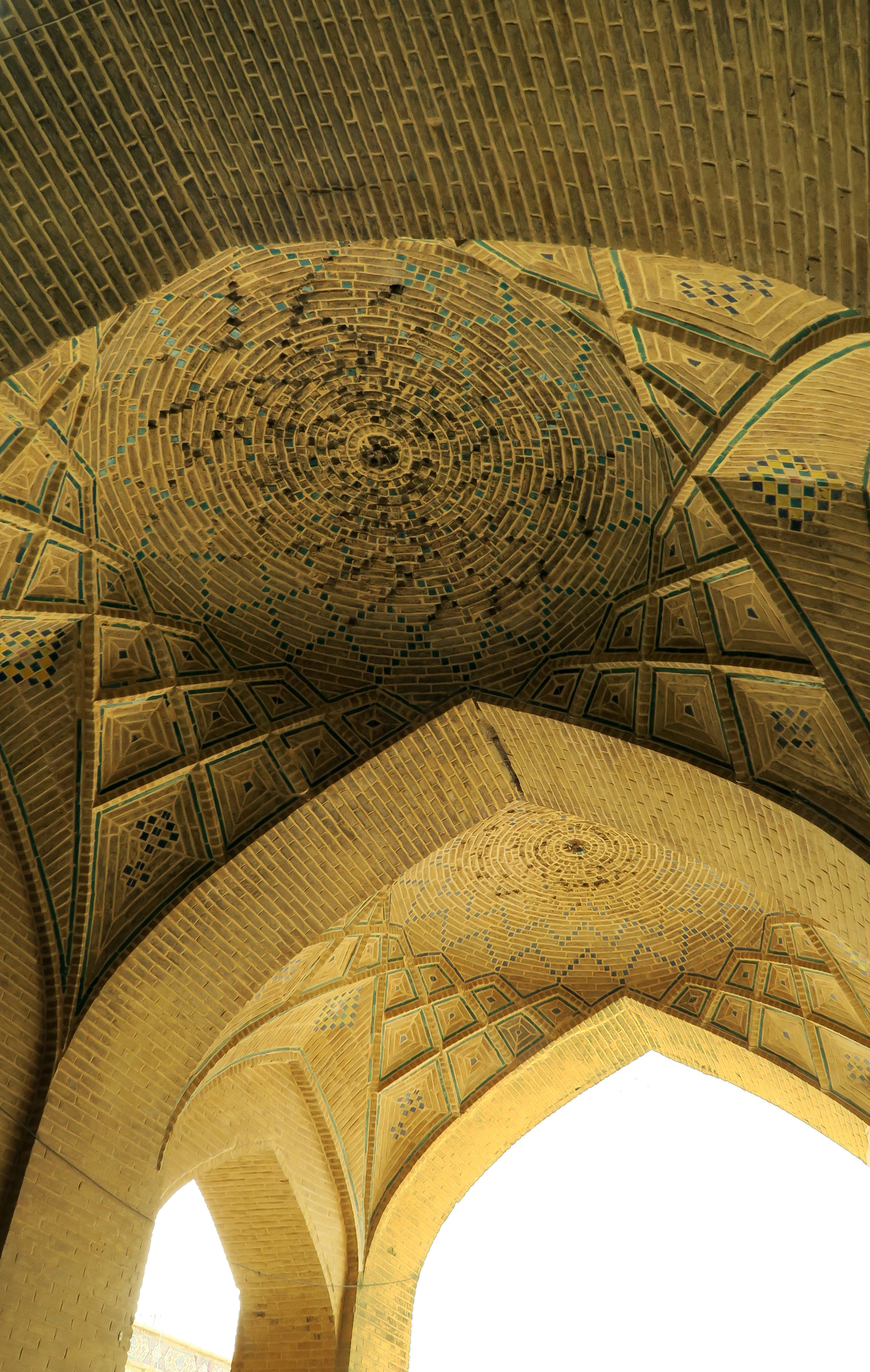 طاق کلنپو با یزدی بندی در مسجد وکیل